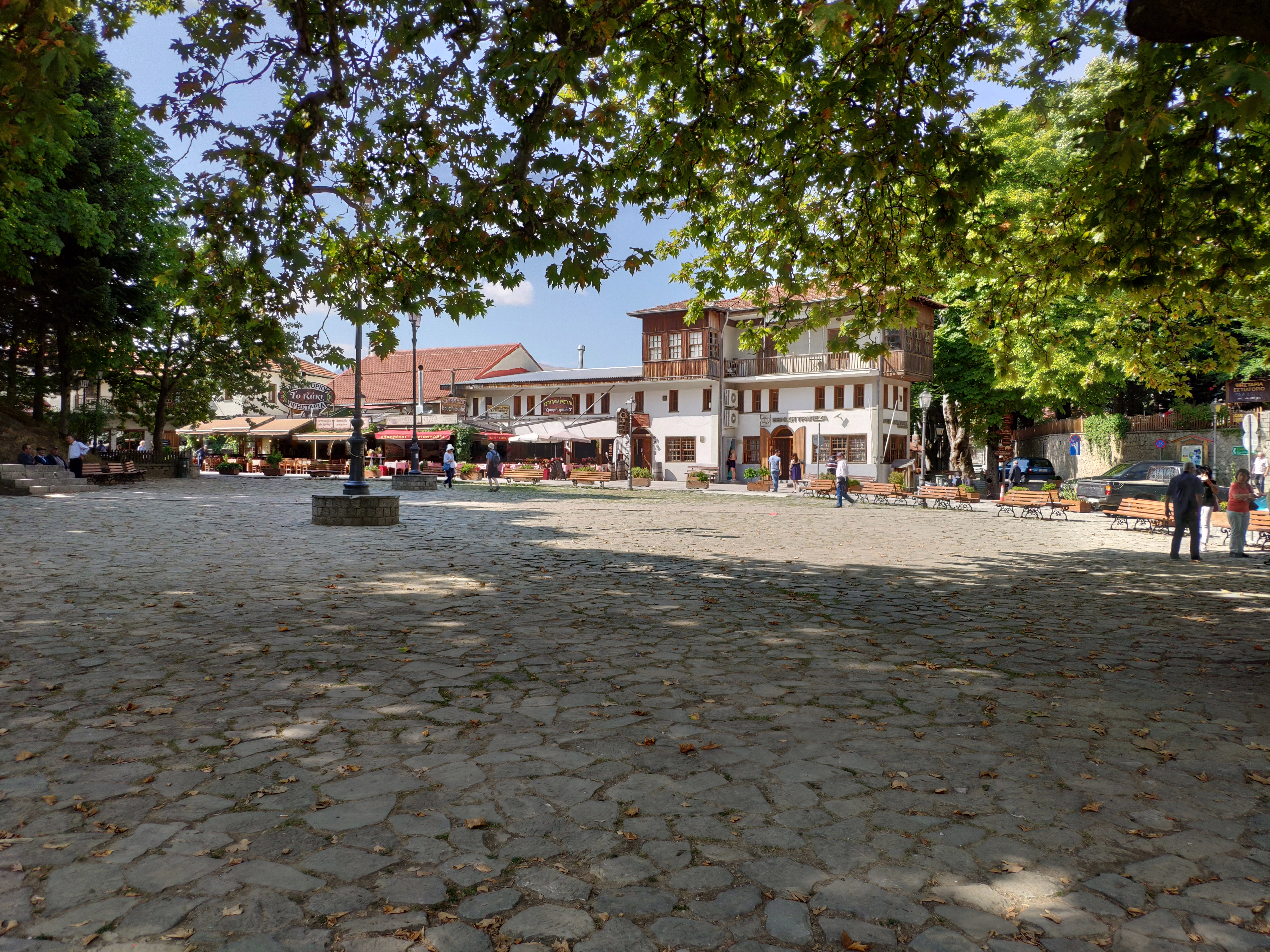 Καταστήματα κεντρικής πλατείας Μετσόβου«Καταστήματα κεντρικής πλατείας Μετσόβου»